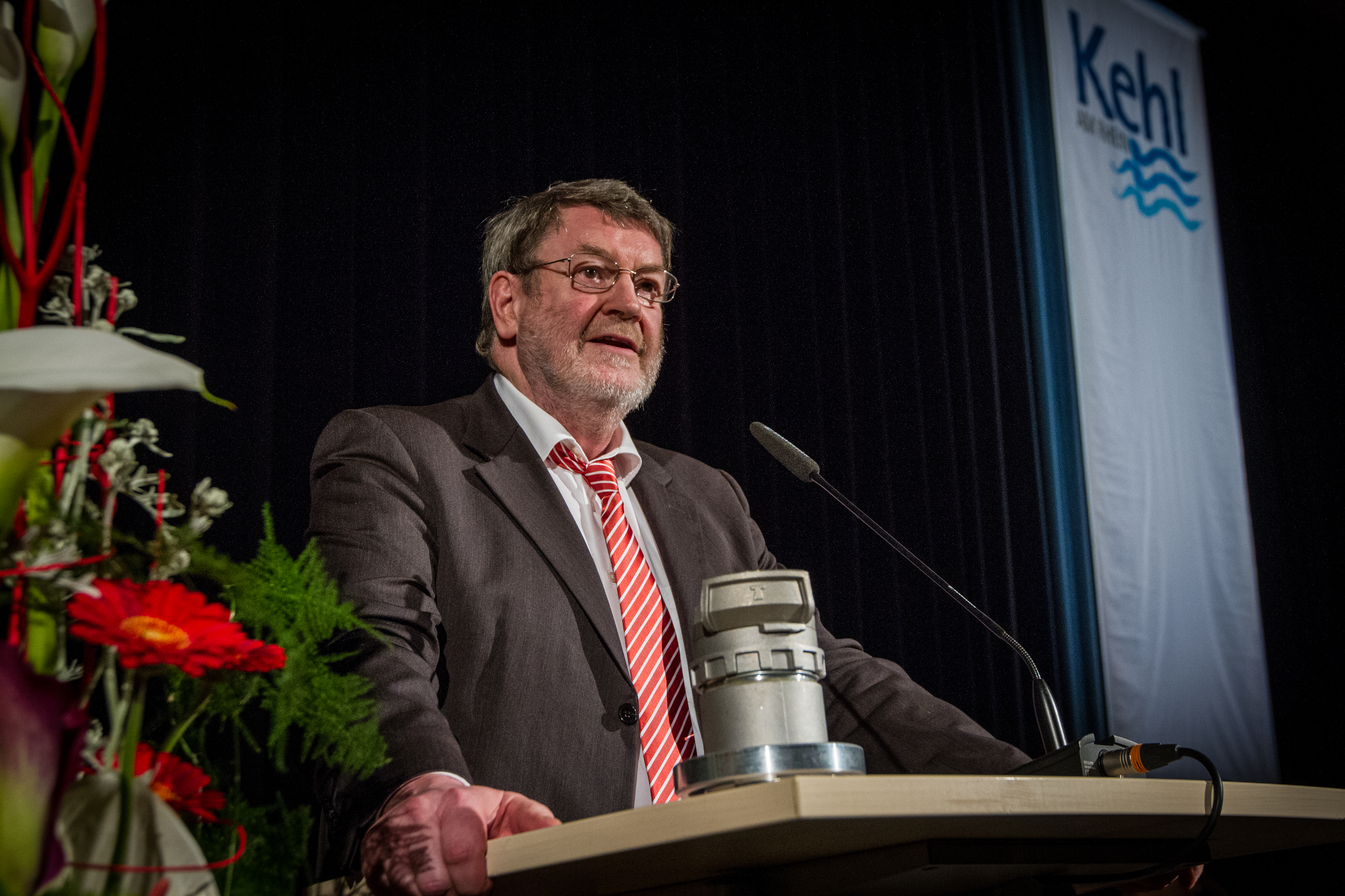 Günther Petry, (* 17 septembre 1949 à Tübingen) est un homme politique allemand. Il a été maire de Kehl jusqu’au 30 avril 2014.